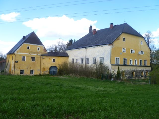 Schloss Hueb heute